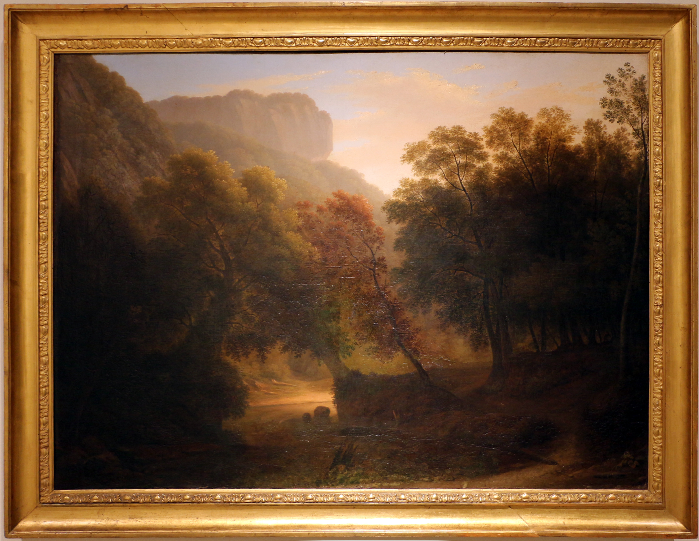 il bosco di papignotitle QS:P1476,it:"il bosco di papigno" label QS:Lit,"il bosco di papigno"